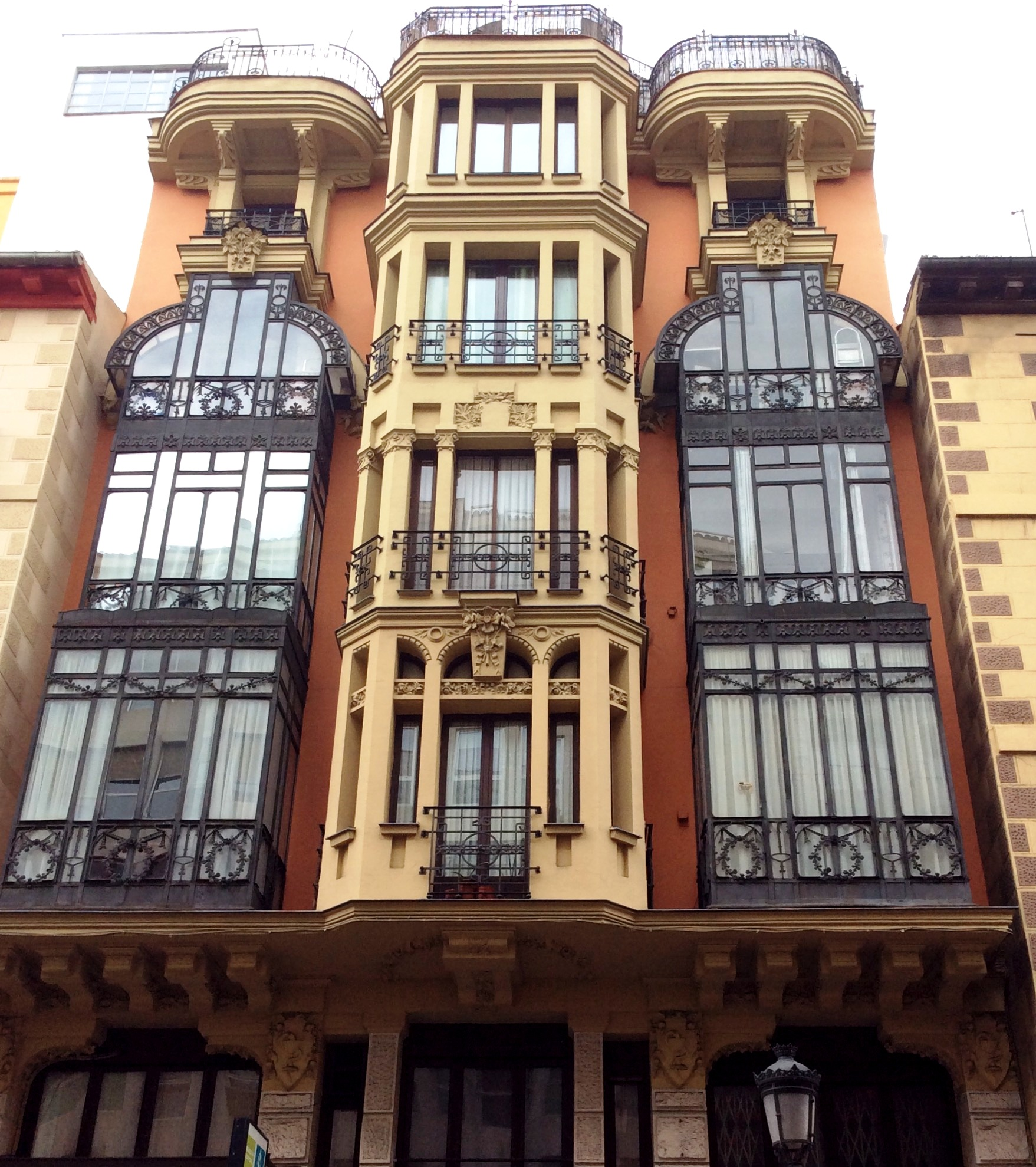 Edificio modernista construido por el arquitecto Jesús Carrasco-Muñoz Encina y promovido por Roberto Moreno, propietario de la Botica de la Reina Madre, que se encuentra en la planta baja. Se hizo entre 1912 y 1914. Se encuentra en el número 59 de la Calle Mayor de Madrid, España.